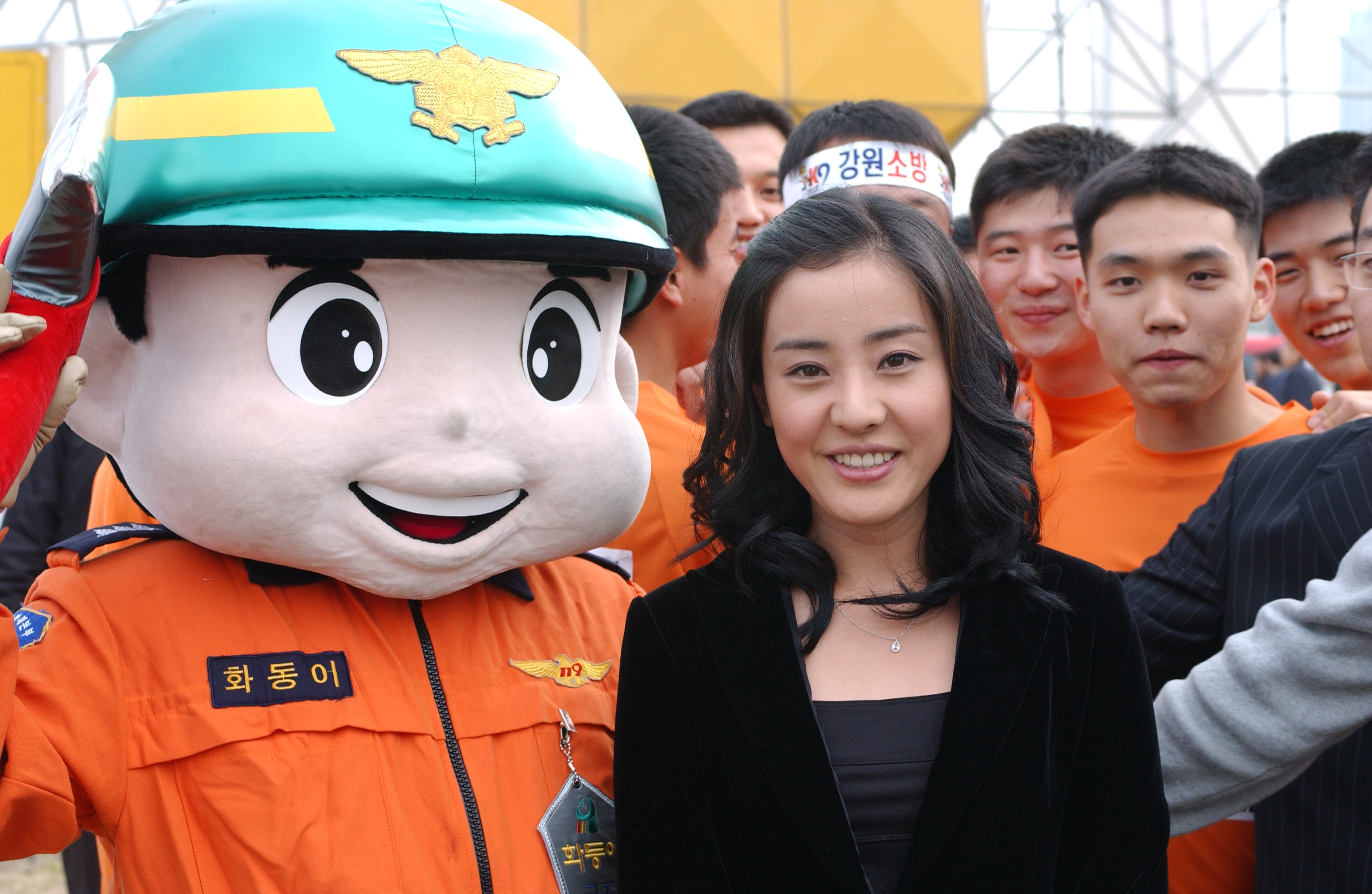 2004년 제2회 전국119마라톤에서 배우 박은혜가 포즈를 취하고 있다.